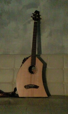 一五一会(いちごいちえ)(ベーシック)、2008年頃、アンプラグドで演奏したお店にて。